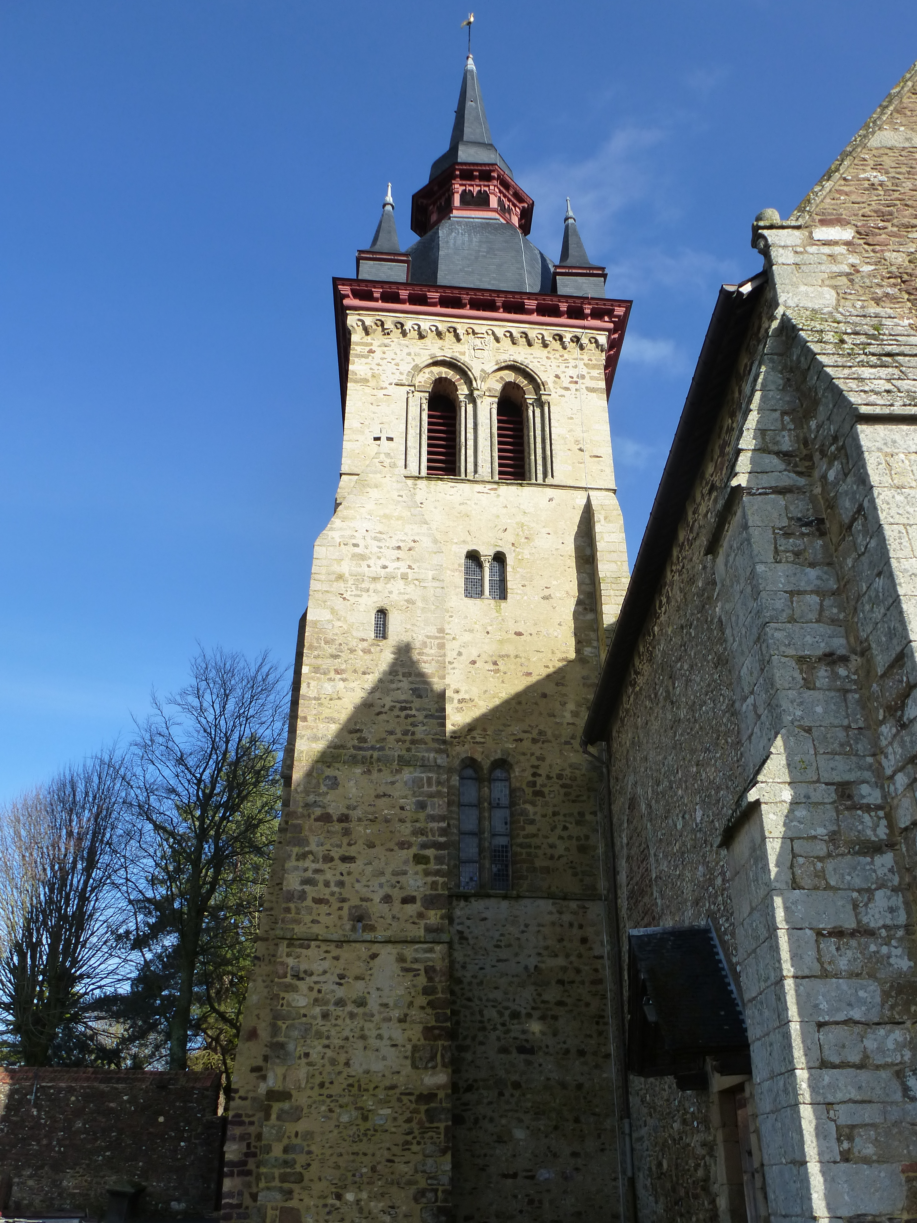 l'eglise de st meen le grand